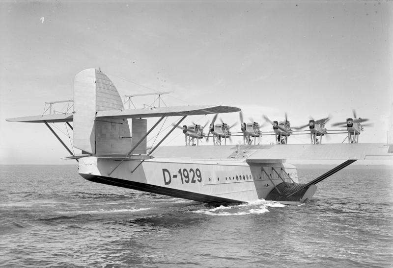 Der grandiose Flug der "Do X" über den Kanal von Amsterdam nach England! Das Riesensteuer und die 12 Motore des deutschen Riesenflugschiffes "Do X" mit 38 Passagieren an Bord vor ihrem Start nach England.